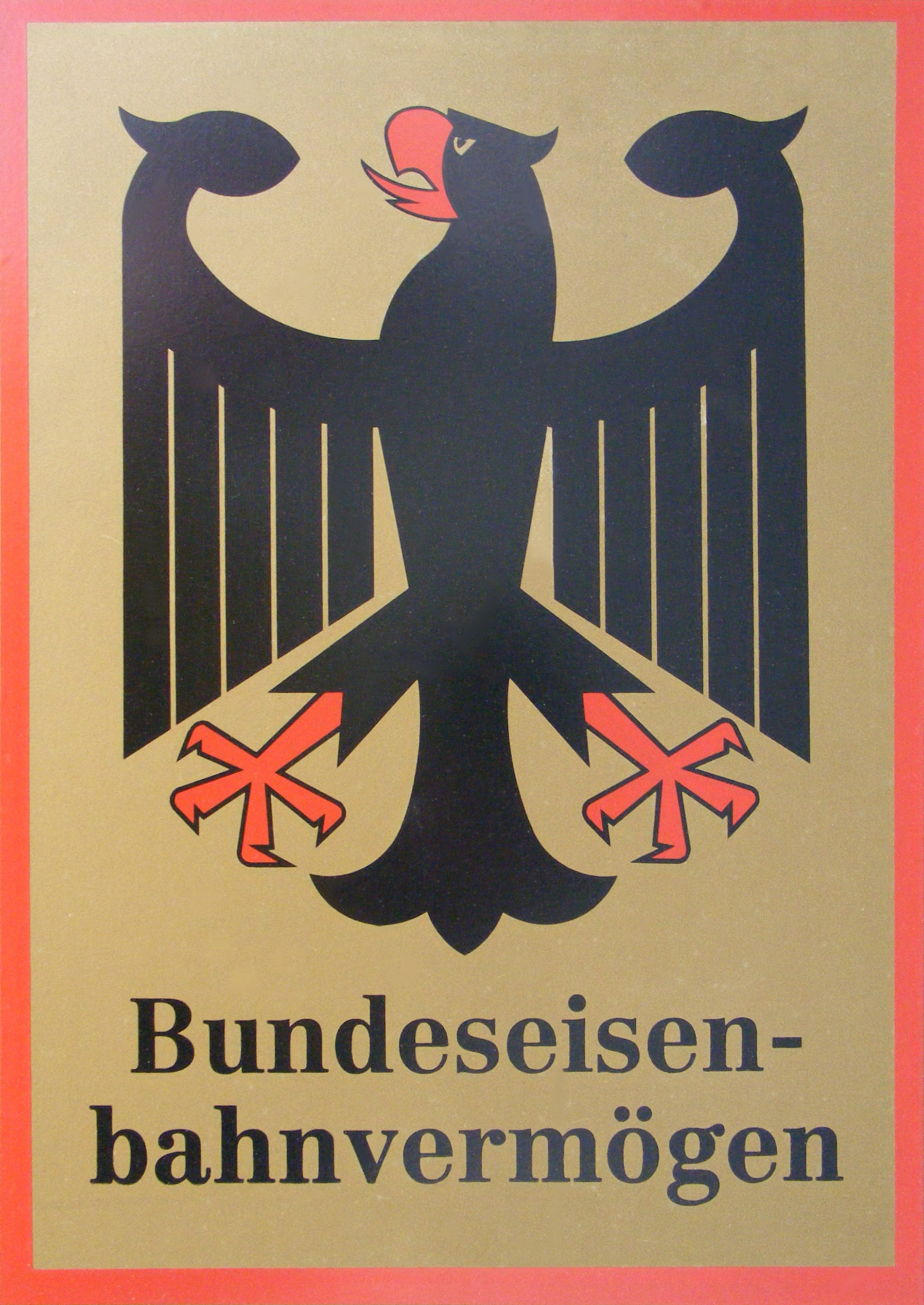 Nuremberg, Hinterm Bahnhof 35